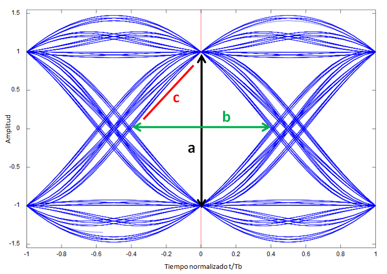 Propiedades de la señal